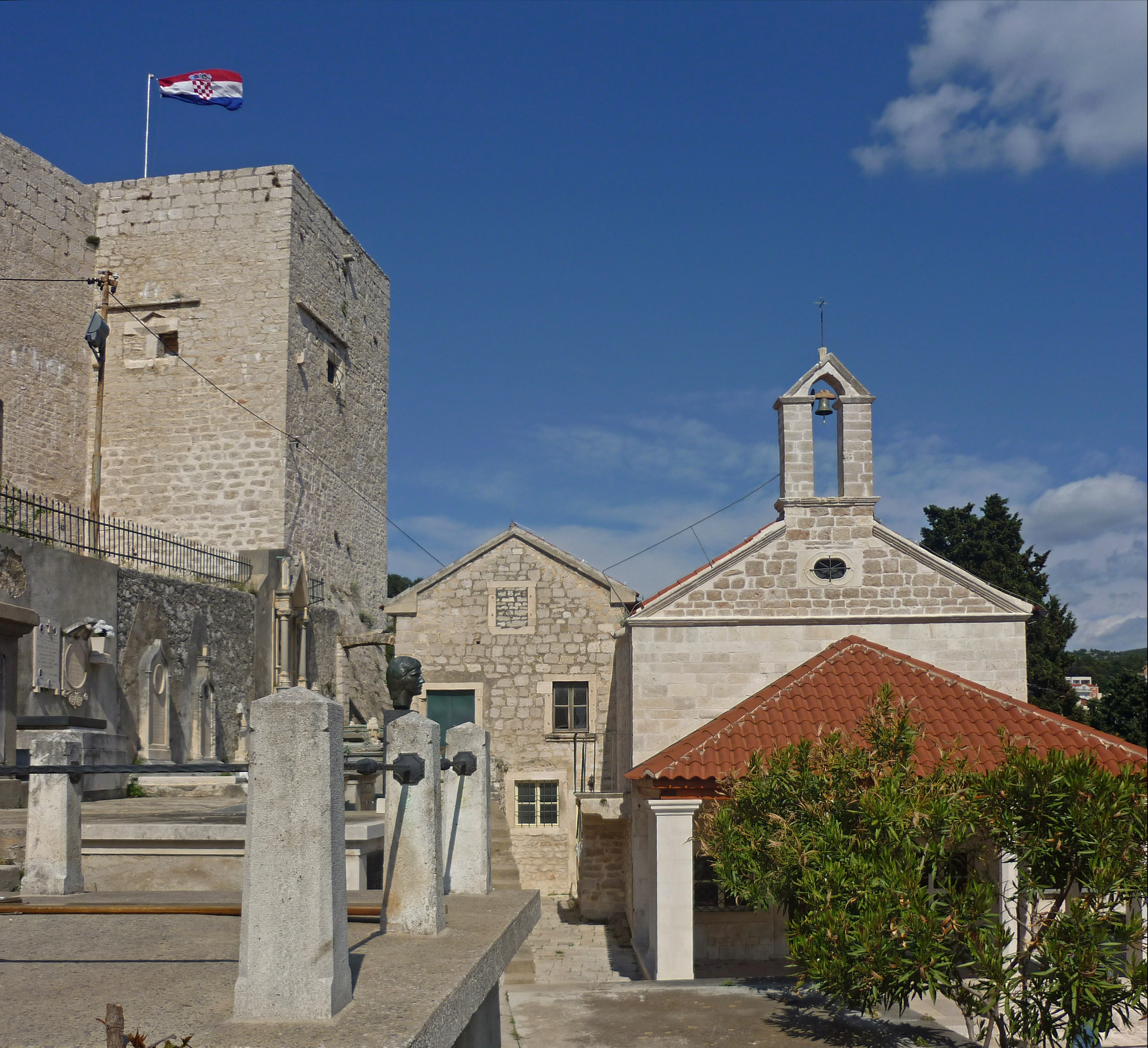 Festung St. Michael und der Annenfriedhof mit Annenkapelle in Šibenik